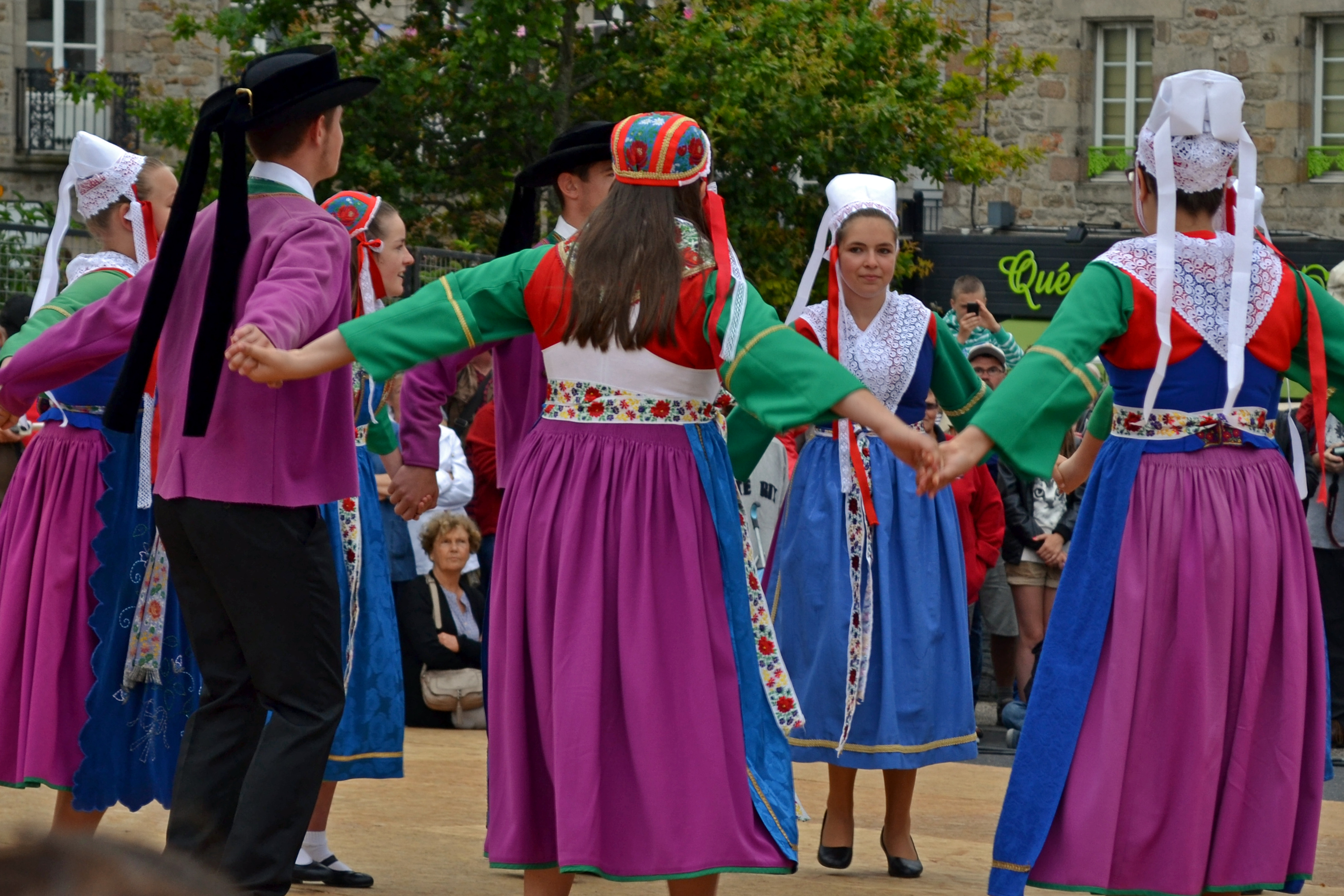 Spectacles organisée pour la journée anniversaire des 60 ans de la Kevrenn Kastell à Saint-Pol-de-Léon le 12 juillet 2014.